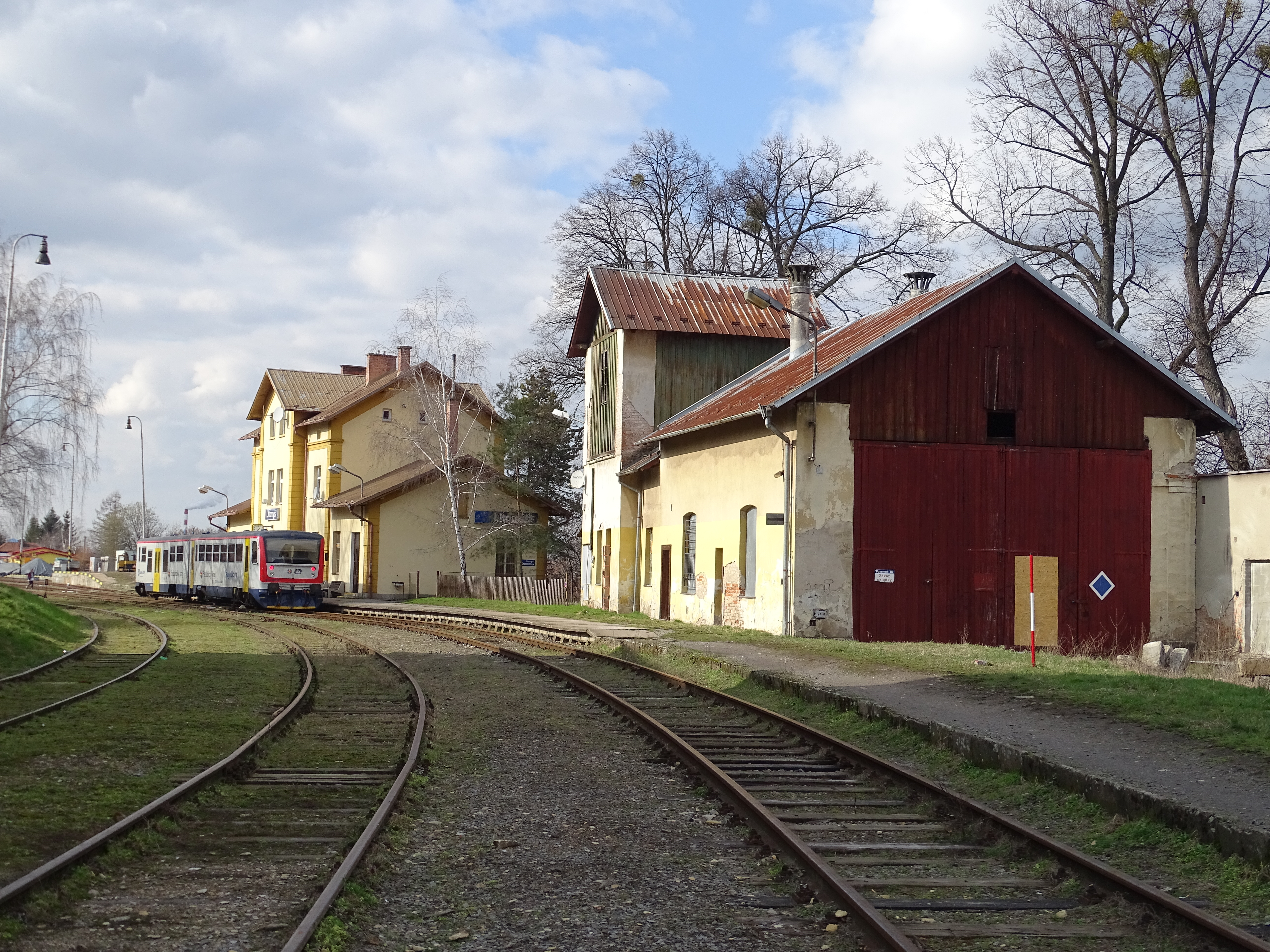 vlakové nádraží Litomyšl